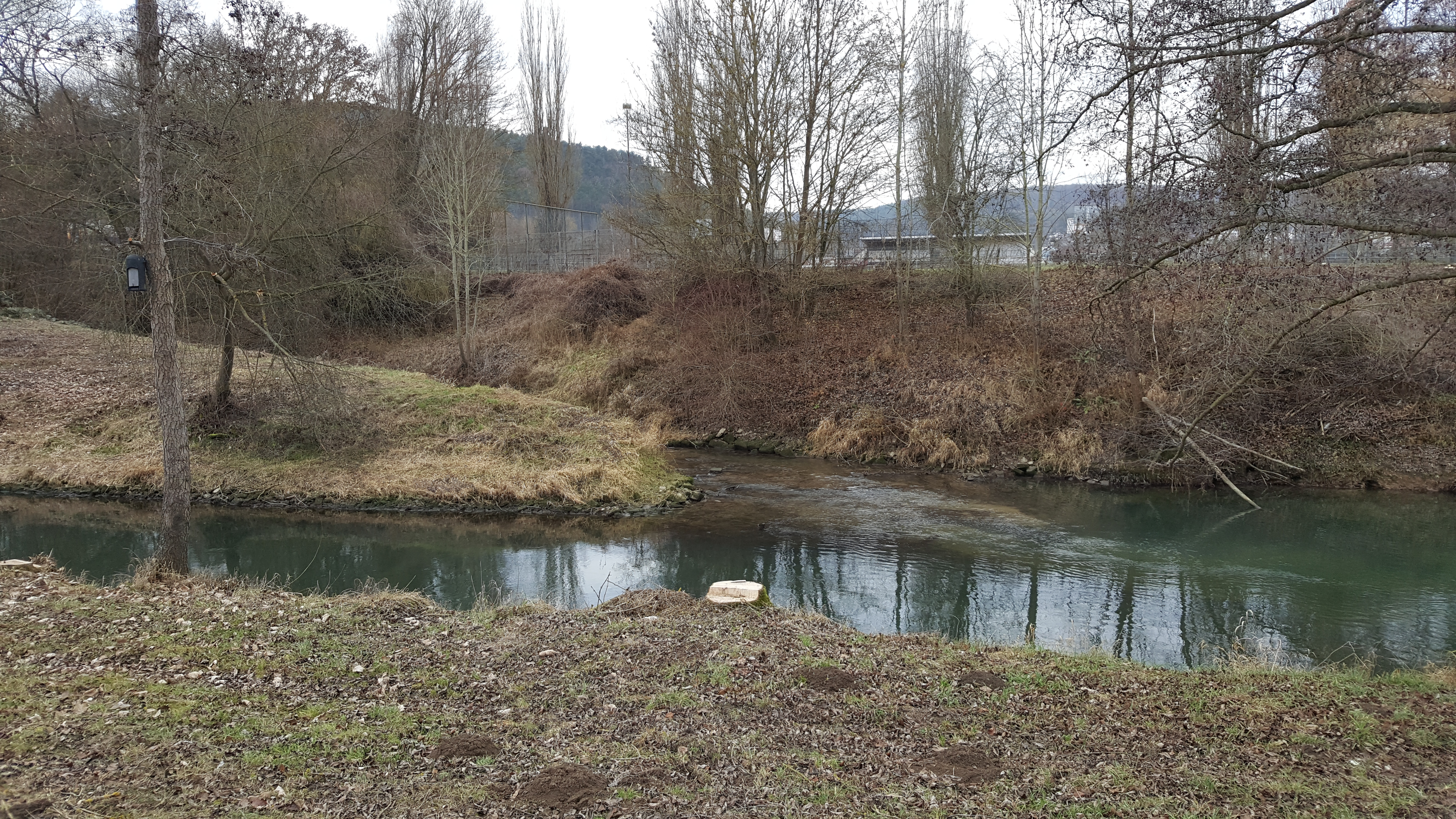 Der Brehmbach mündet in Tauberbischofsheim von links in die Tauber.